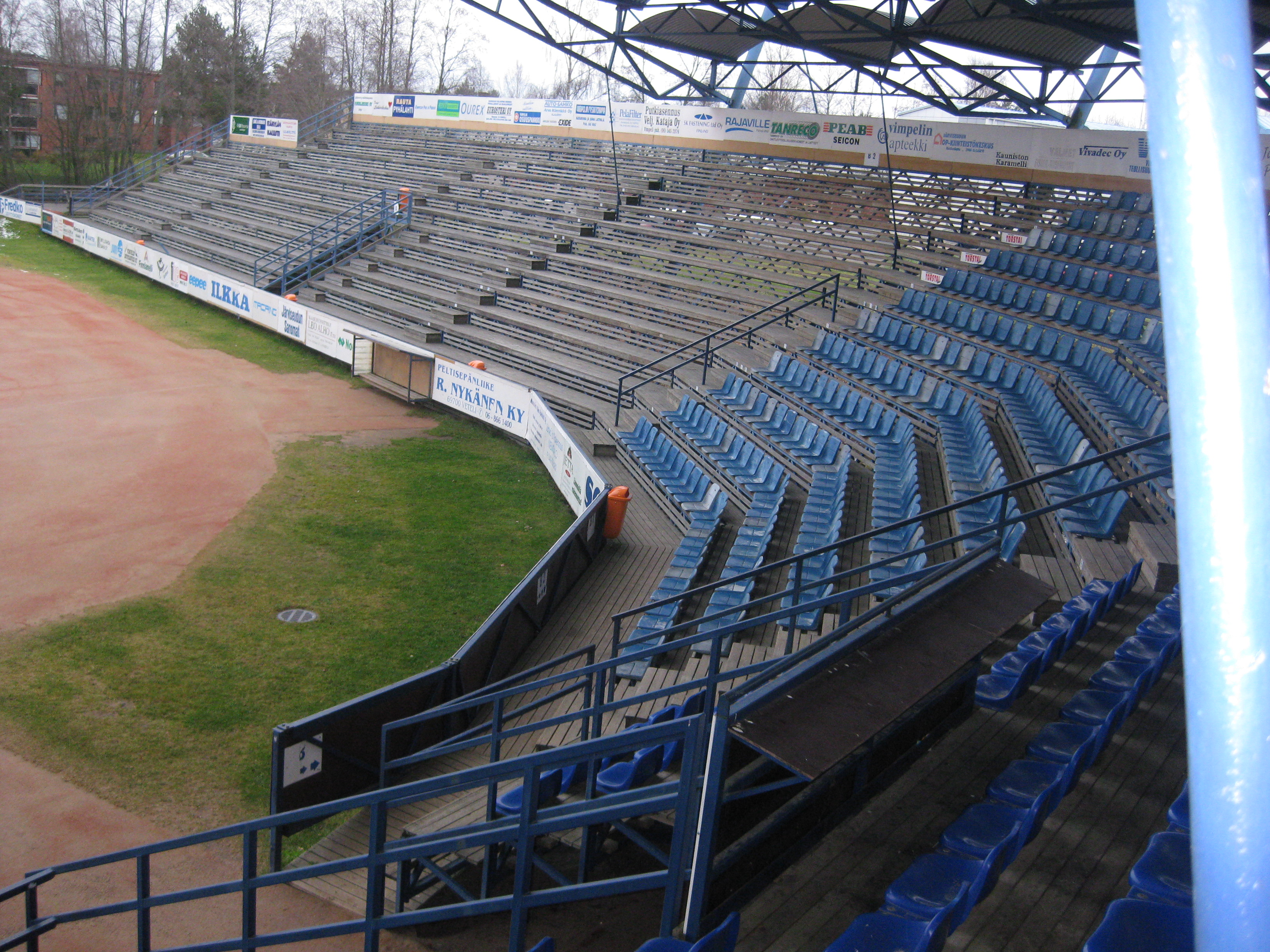 Saarikenttä